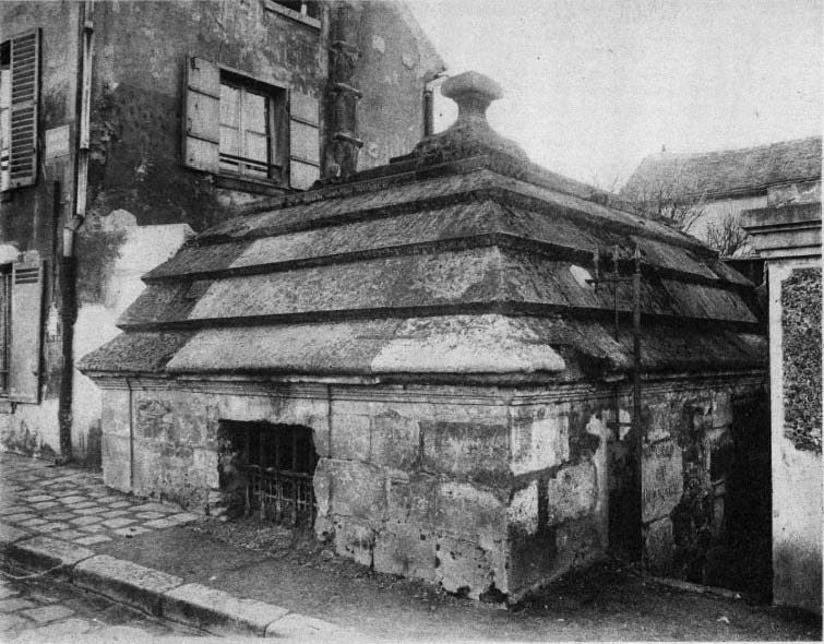 Regard du Bernage, Paris. Photo extraite du procès-verbal de la Commission municipale du Vieux Paris, 12 octobre 1899